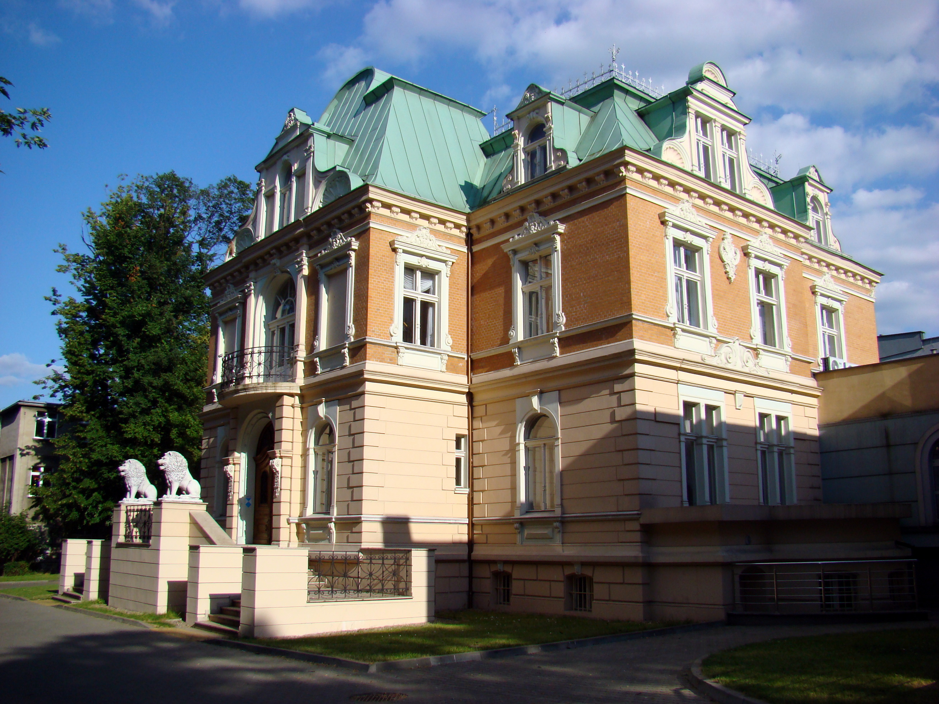 Budynek Młodzieżowego Domu Kultury w Częstochowie, dawna willa właściciela huty "Częstochowa", Bernarda Hantkego. Zbudowana w latach 1900-1903